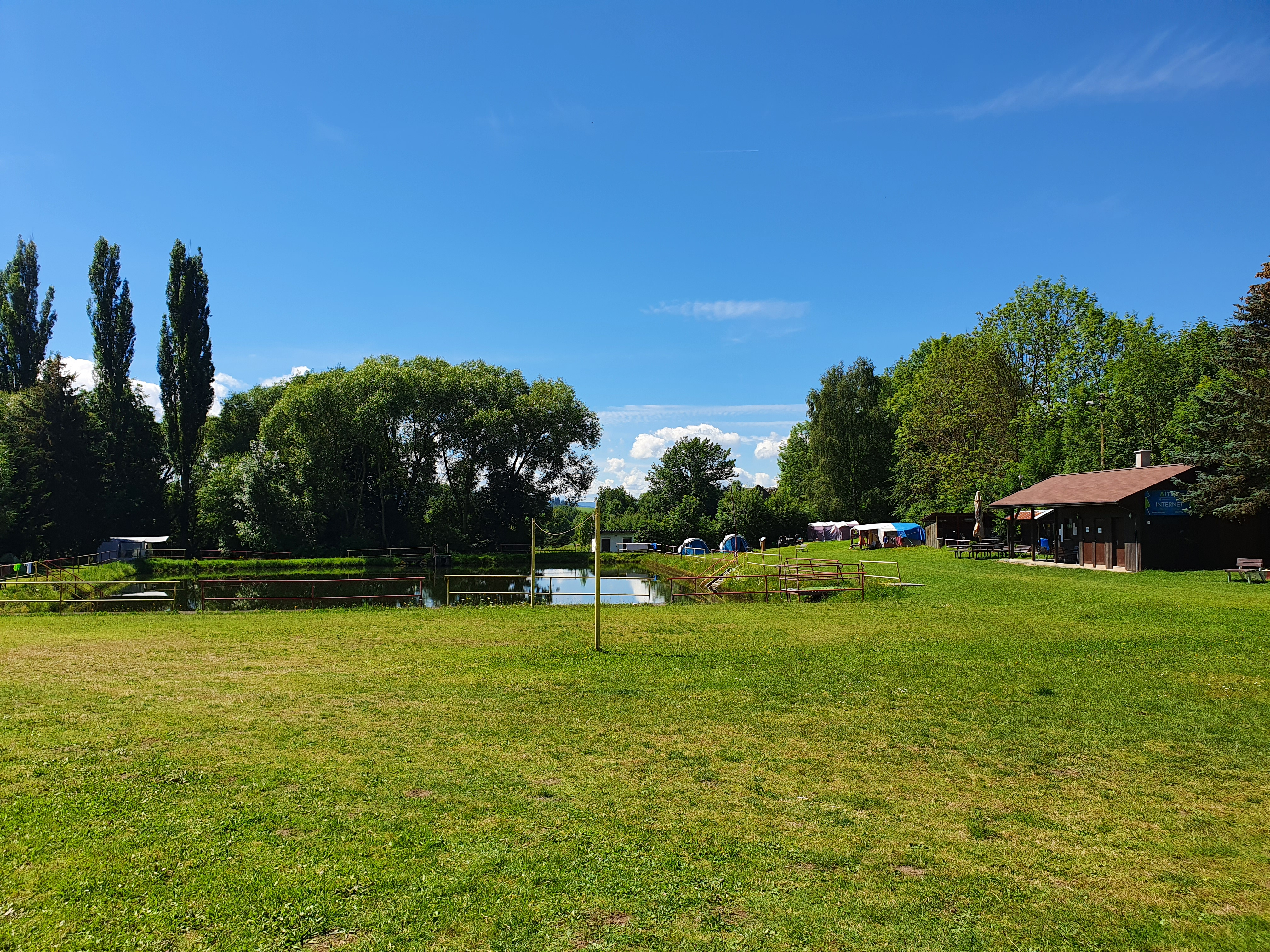 Smržovice